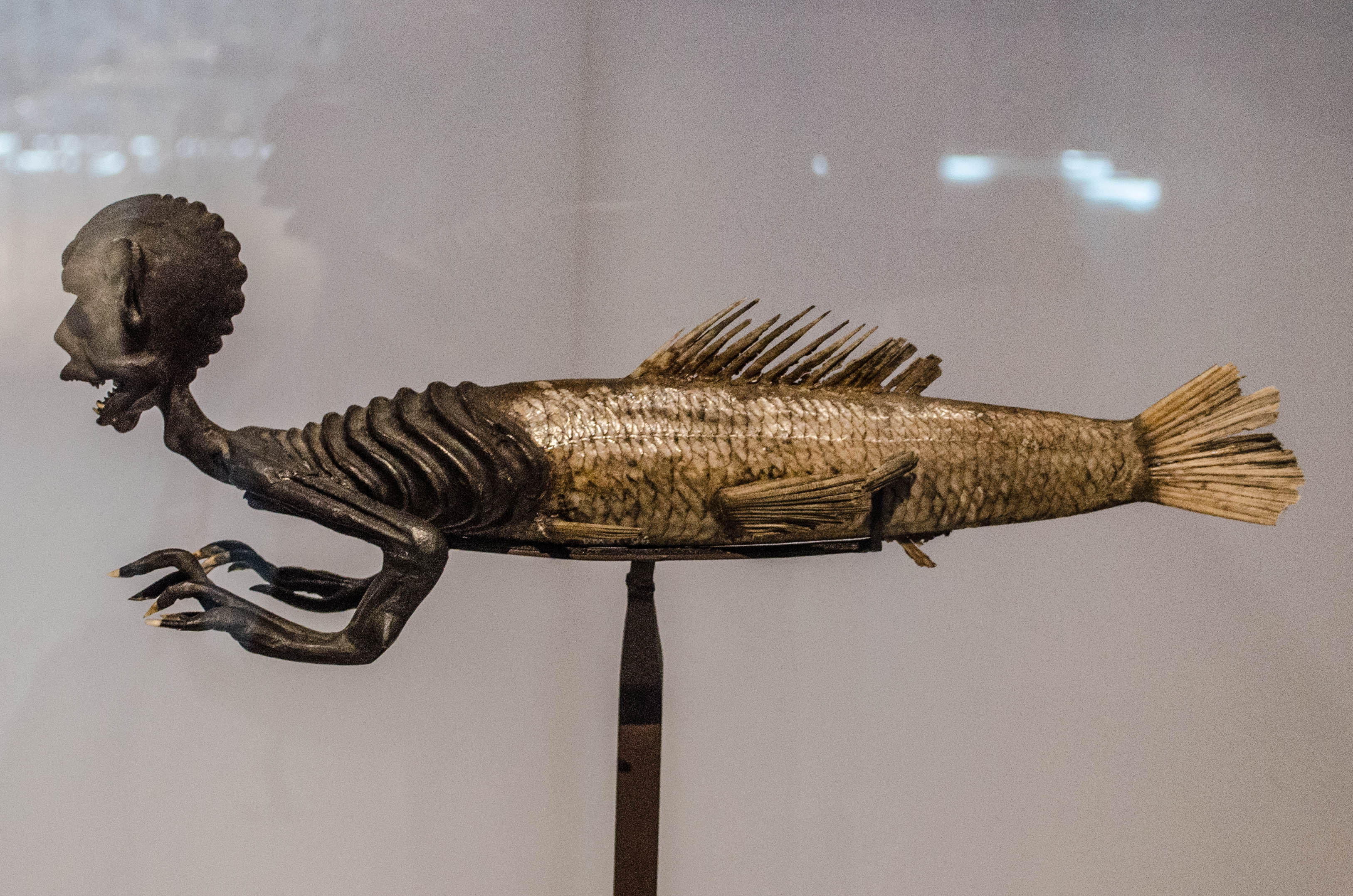 Sirène, Extrême-Orient, XIXe s. : bois, poils, laines, queue, nageoires et dents de poisson, pattes de varan. Marseille, Musée des Civilisations de l’Europe et de la Méditerranée.